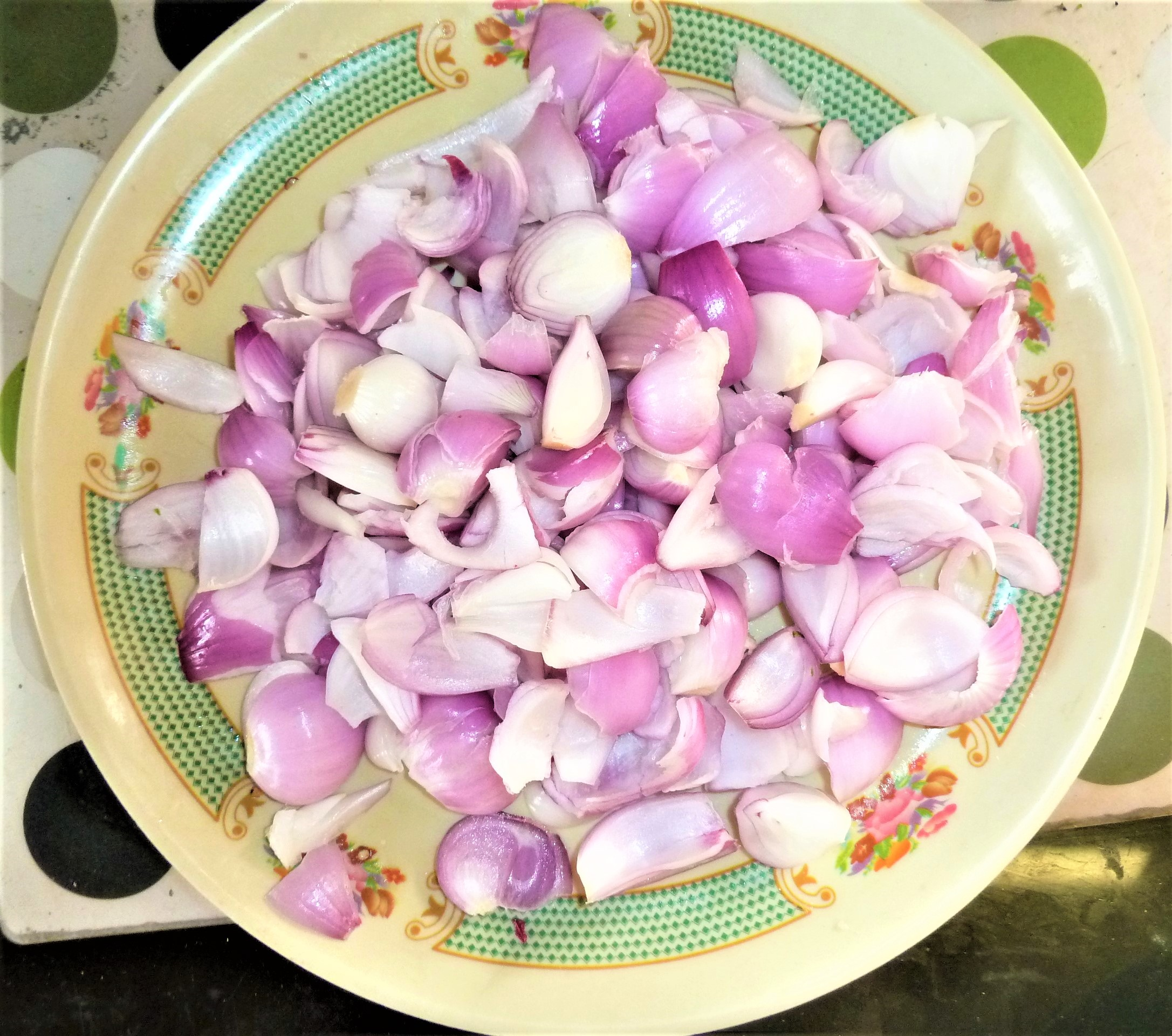 ఉల్లిపాయ ముక్కలు